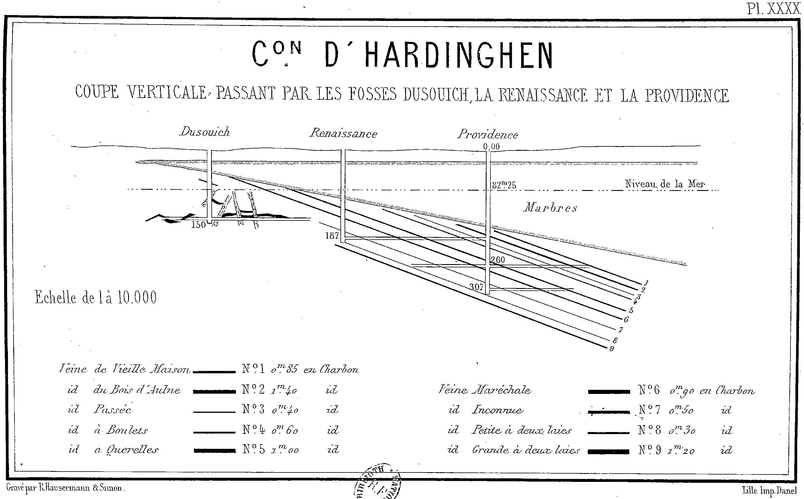 Coupe verticale passant par les fosses Du Souich, La Renaissance et La Providence de la Compagnie des Charbonnages de Réty, Ferques et Hardinghen.